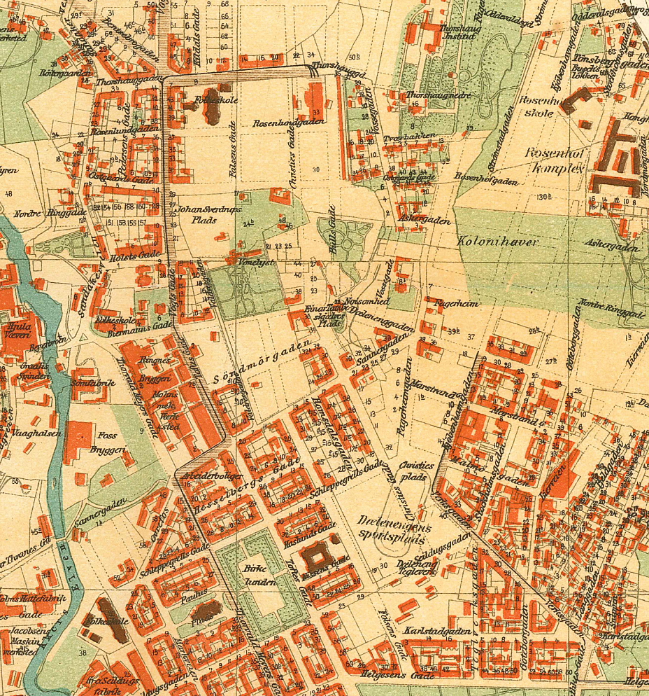 Kart over Dælenenga.